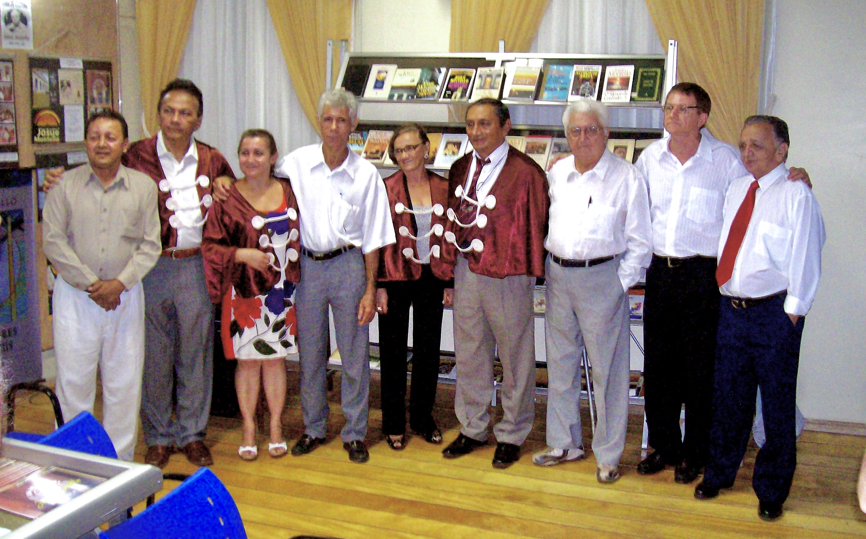 Membros da Academia Imperatrizense de Letras em 25 de Outubro de 2008. Da esquerda para a direita: Domingos Cezar Ribeiro, Itamar Dias Fernandes, Maria Tereza Bomfim, Gilmar Pereira da Silva, Liratelma Alves Cerqueira, Arnaldo Monteiro dos Santos, Benedito Batista Pereira (in memorian), Livaldo Fregona, Jurivê de Macedo (in memorian).